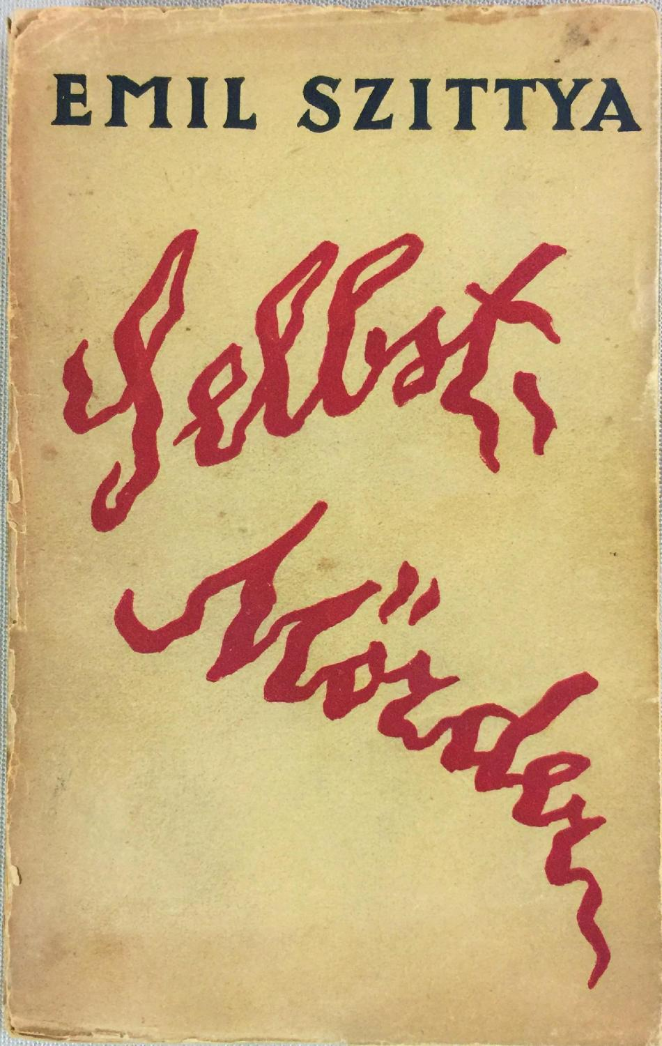 Emil Szittya - Das Selbstmörderbuch (Deckeltitel:Selbst-Mörder). Ein Beitrag zur Kulturgeschichte aller Zeiten und Völker. Leipzig, C. Weller & Co., 1925